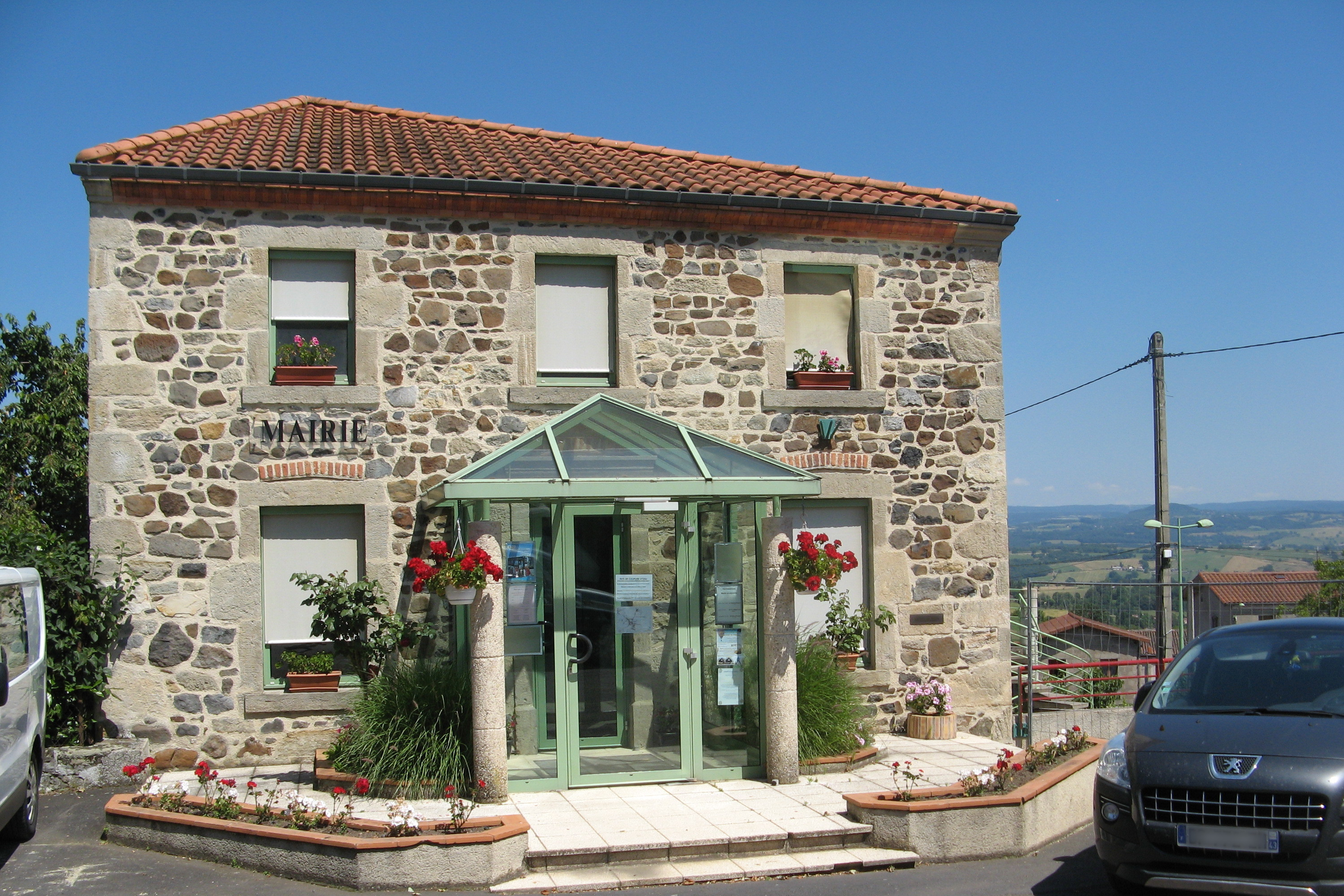 Saint-Babel, mairie